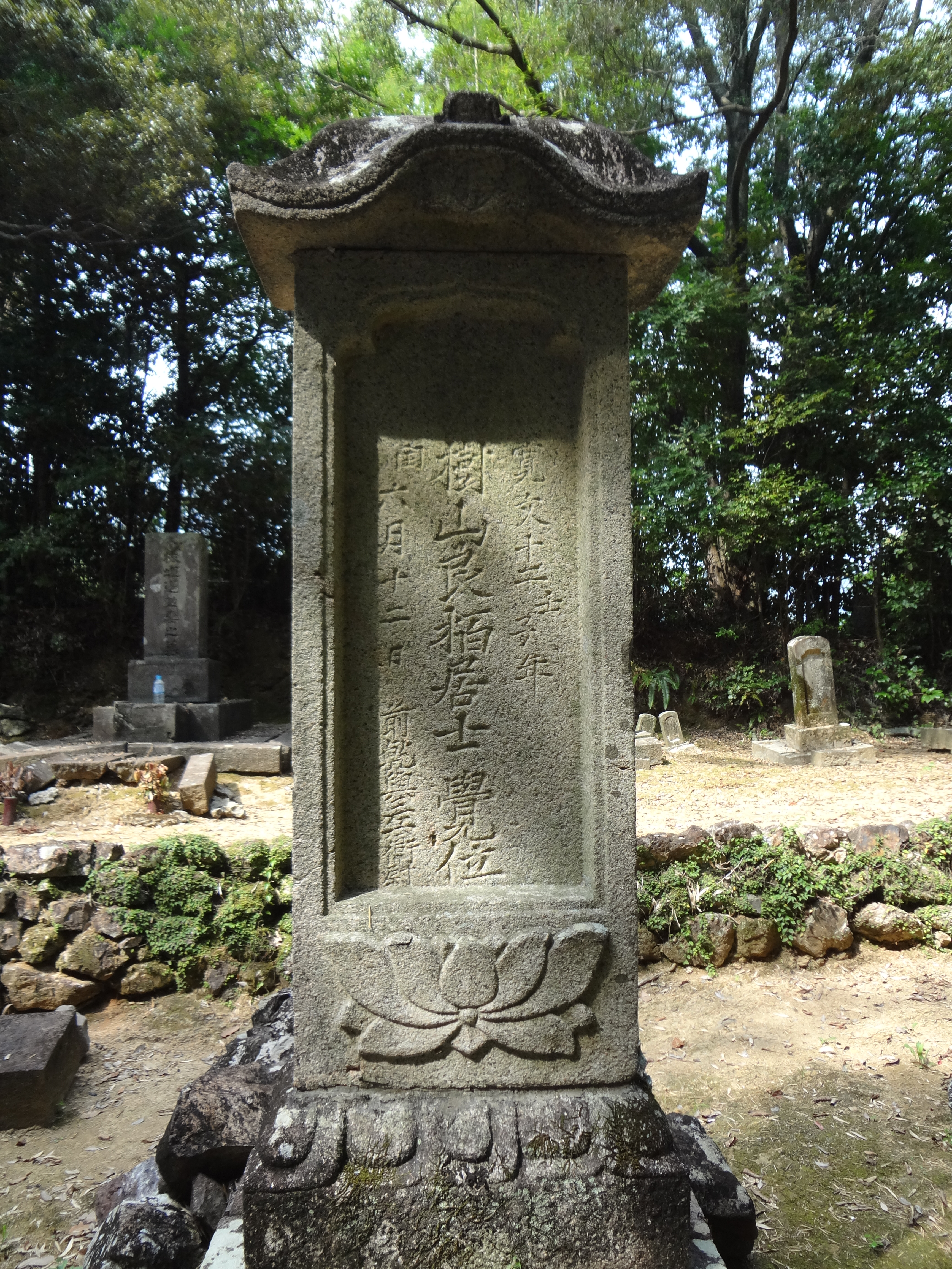 乾正祐( -1672)の墓。板垣駿河守信方の玄孫。板垣退助の七世祖父。